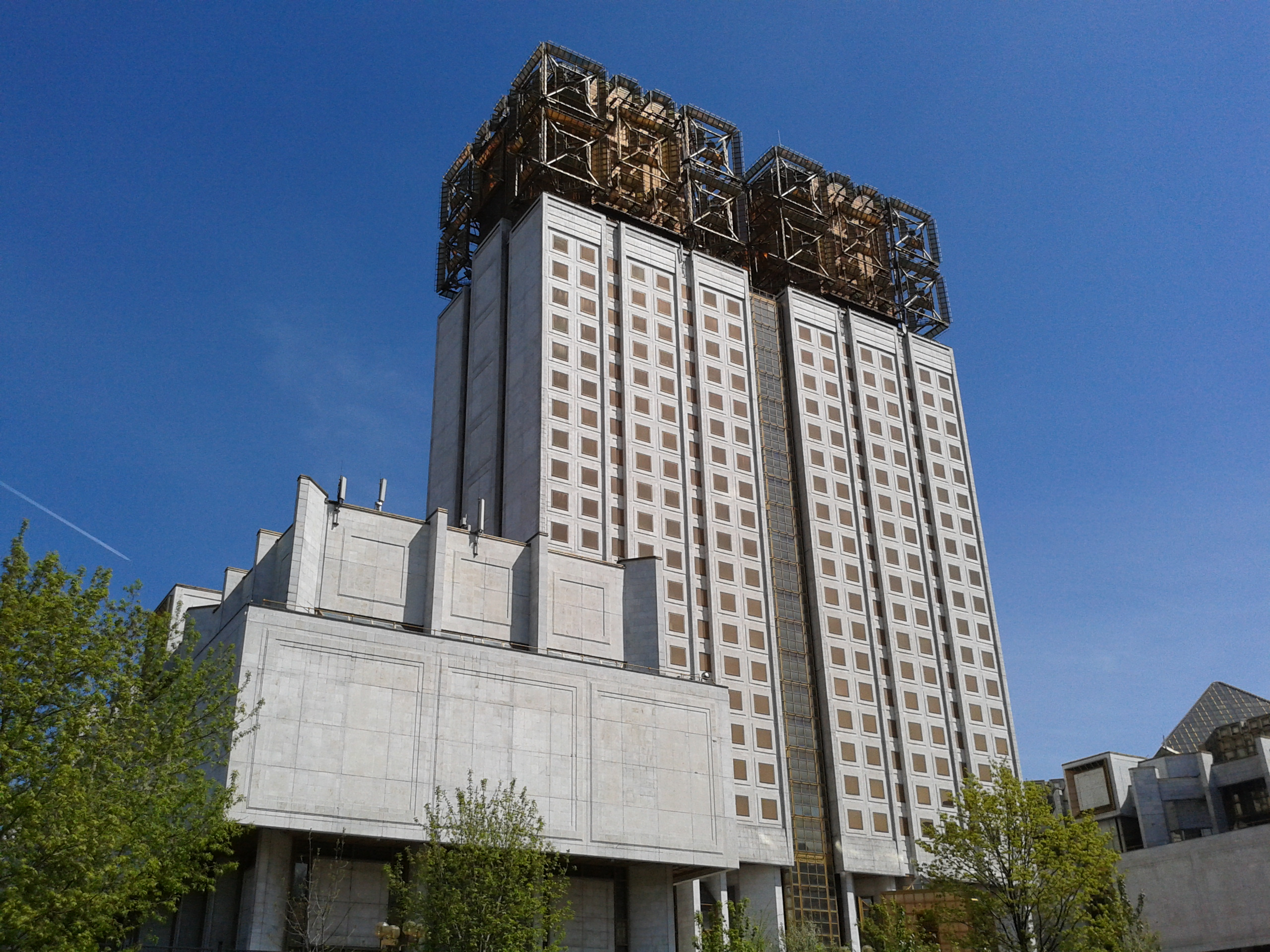 Академия наук, Москва